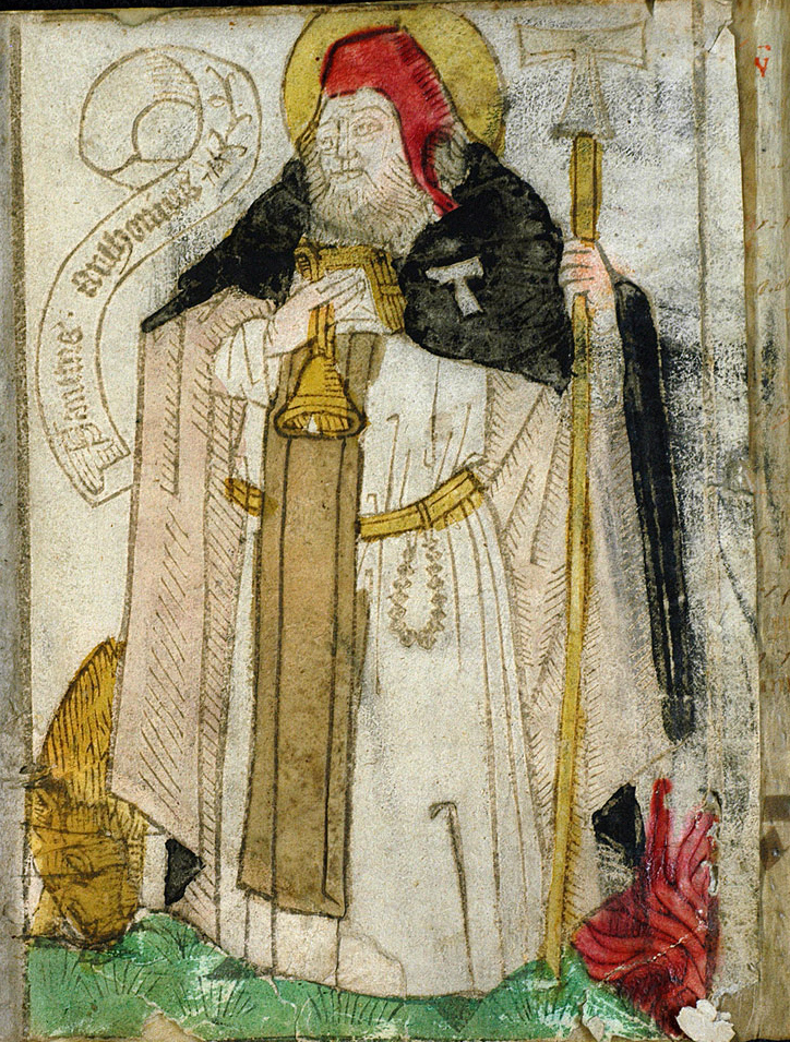 Hl. Antonius, Holzschnitt (koloriert), ca. 1460/70